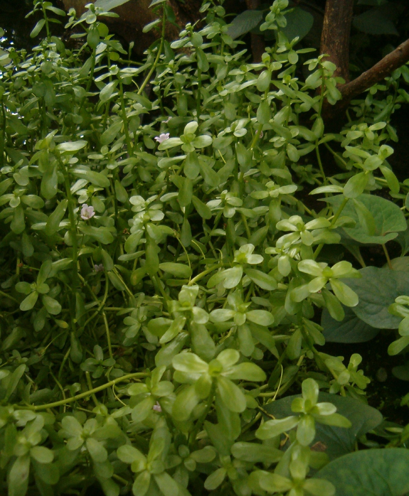 At Botanical Gardens Berlin-Dahlem Species Bacopa monnieri